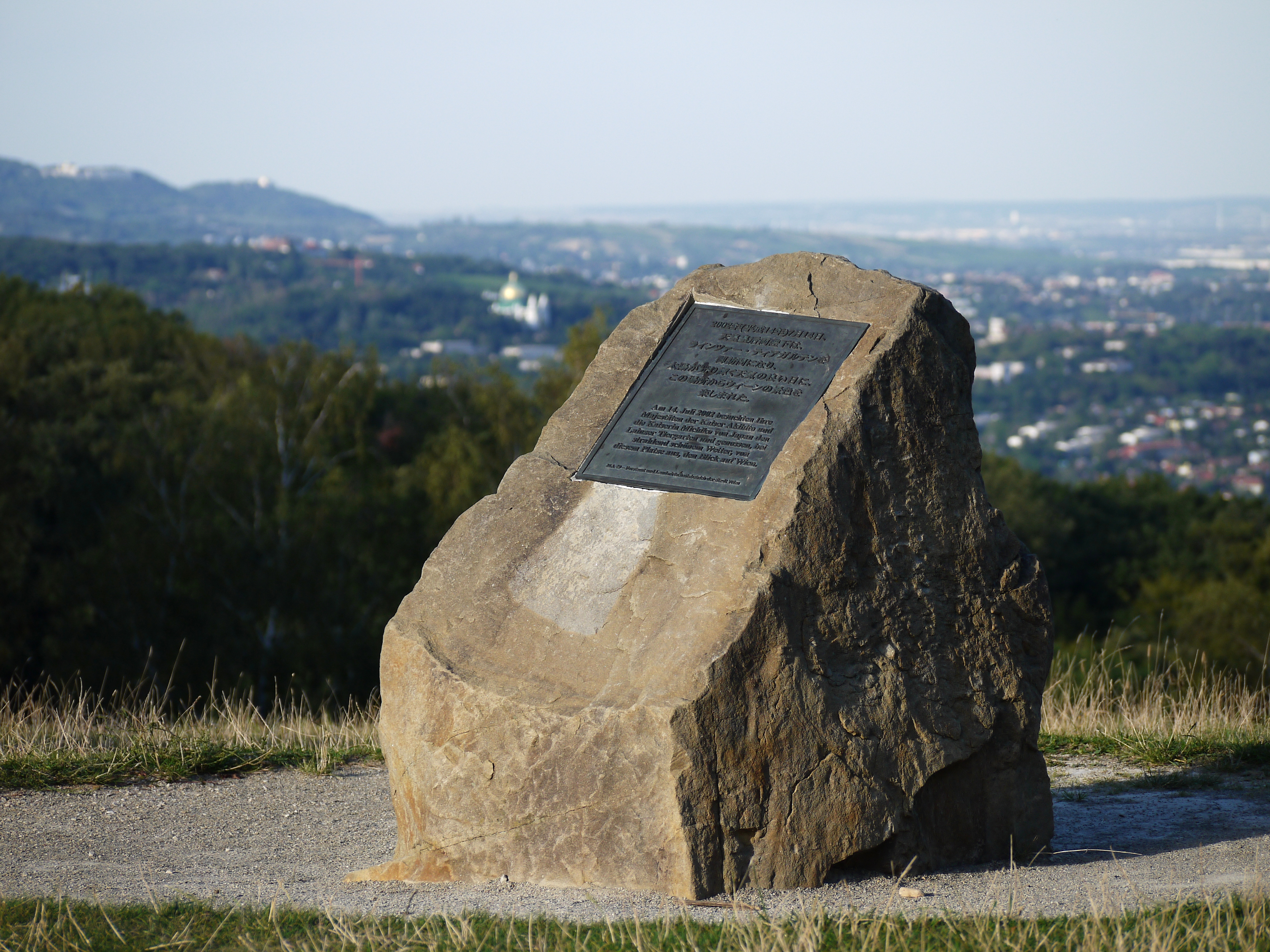 Kleindenkmale